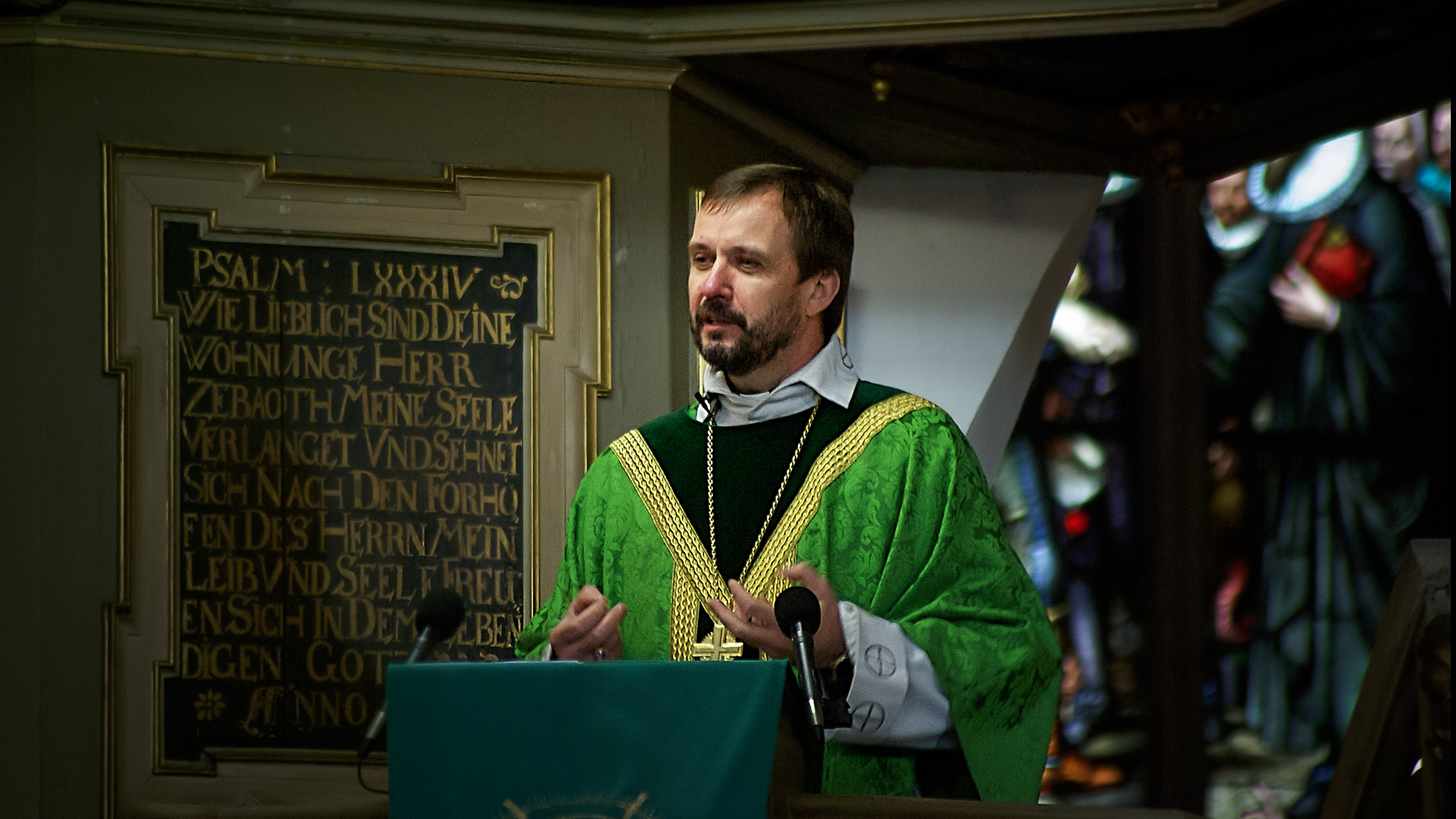 Jānis Vanags (arhibīskaps)